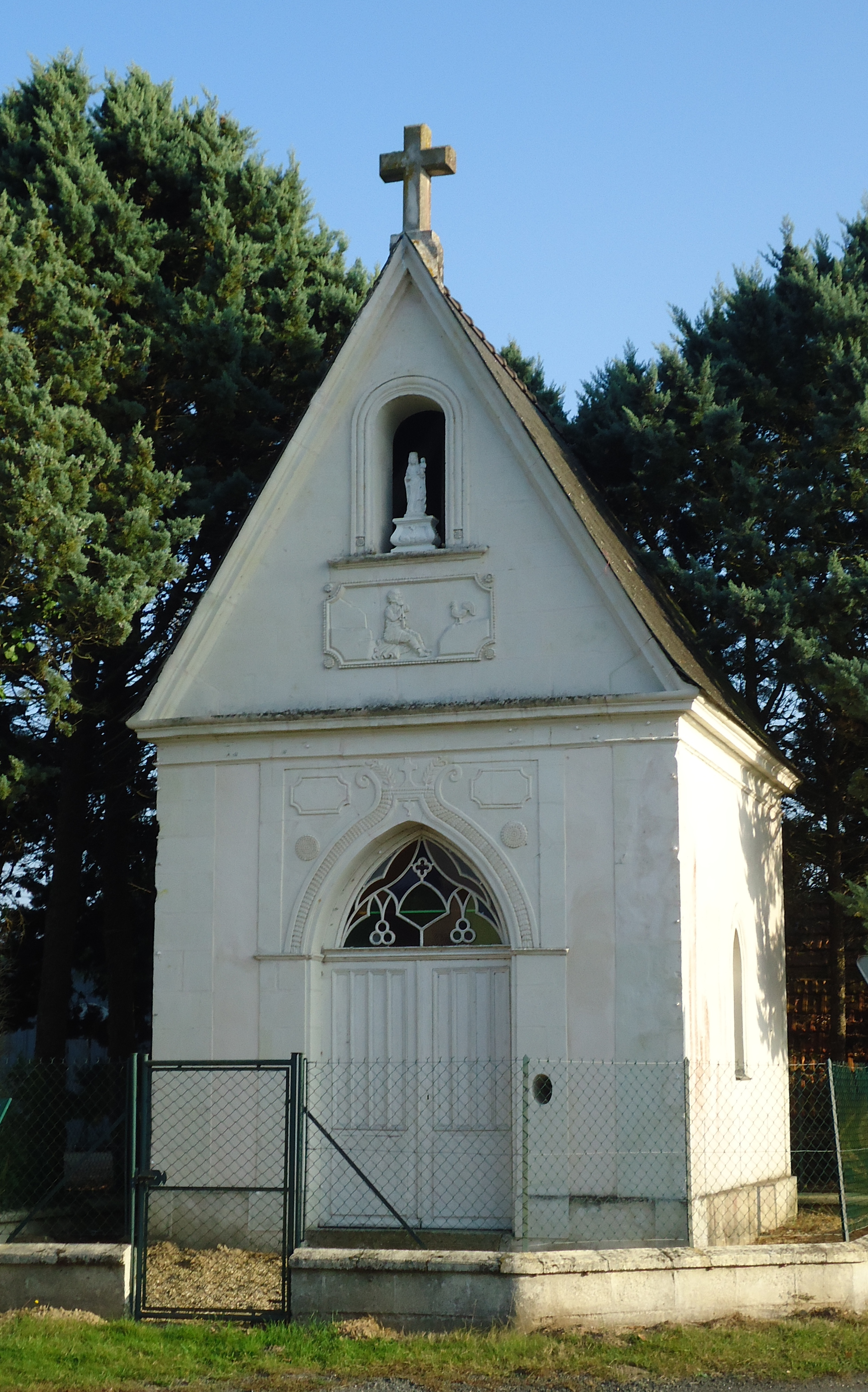 Chapelle Mabilleau - La Chapelle-aux-Choux - Sarthe (72)